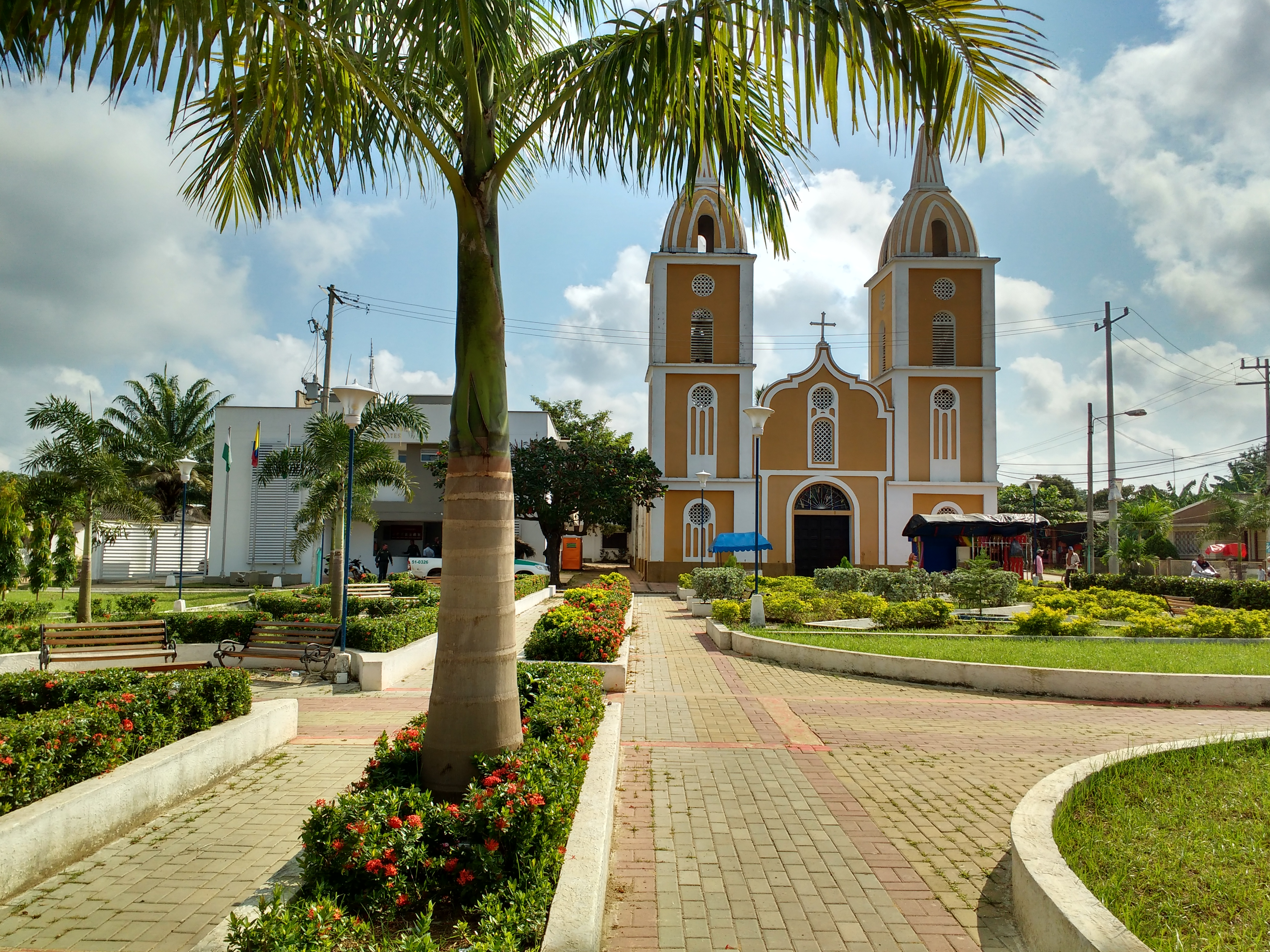 Plaza de San Roque Esta fotografía fue tomada en el municipio colombiano con código 13433.